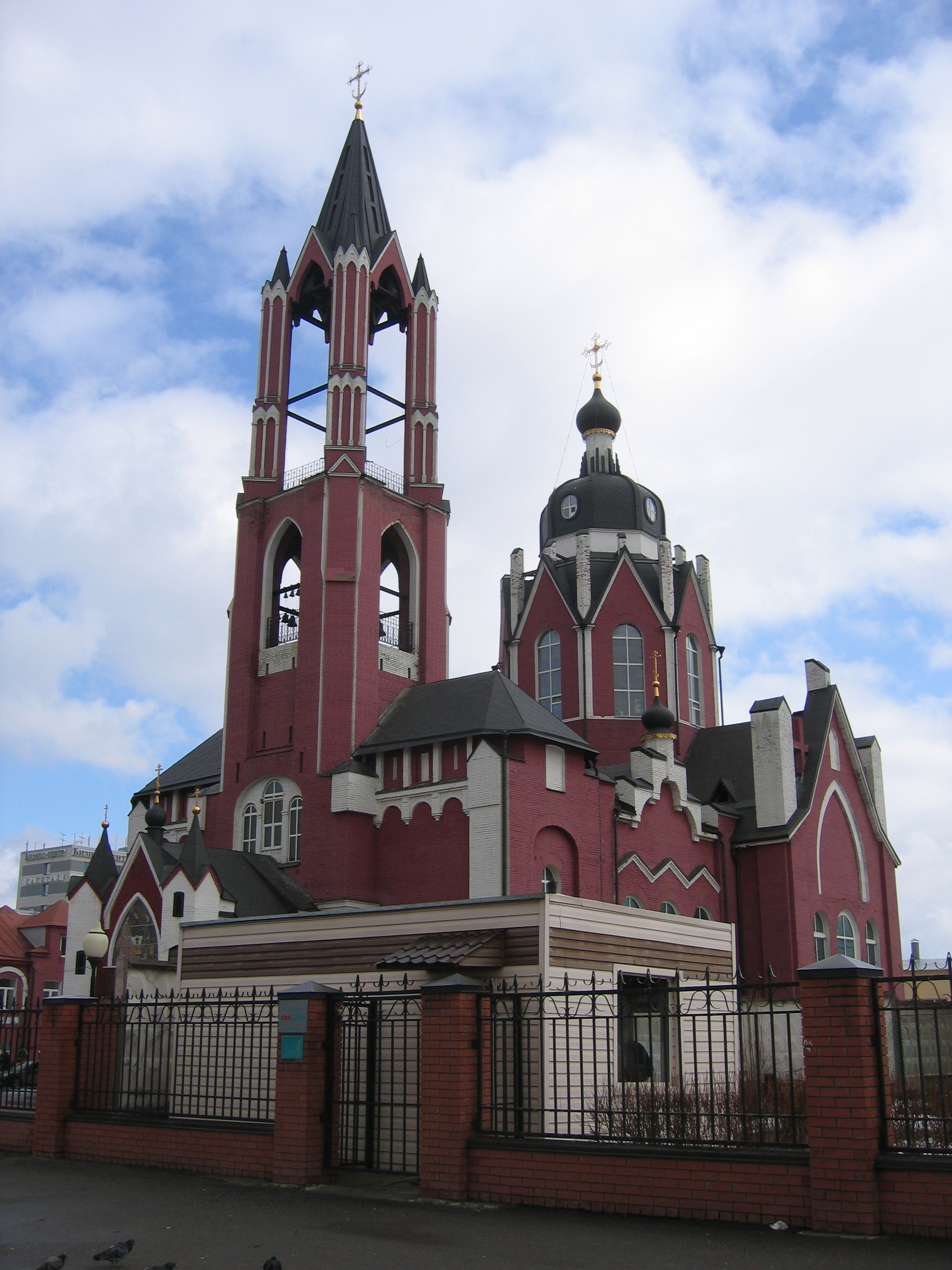 Собор Св. Троицы в Щёлкове